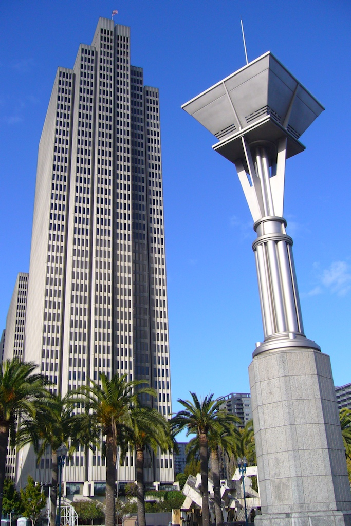 Embarcadero 4 — at the Embarcadero Center.